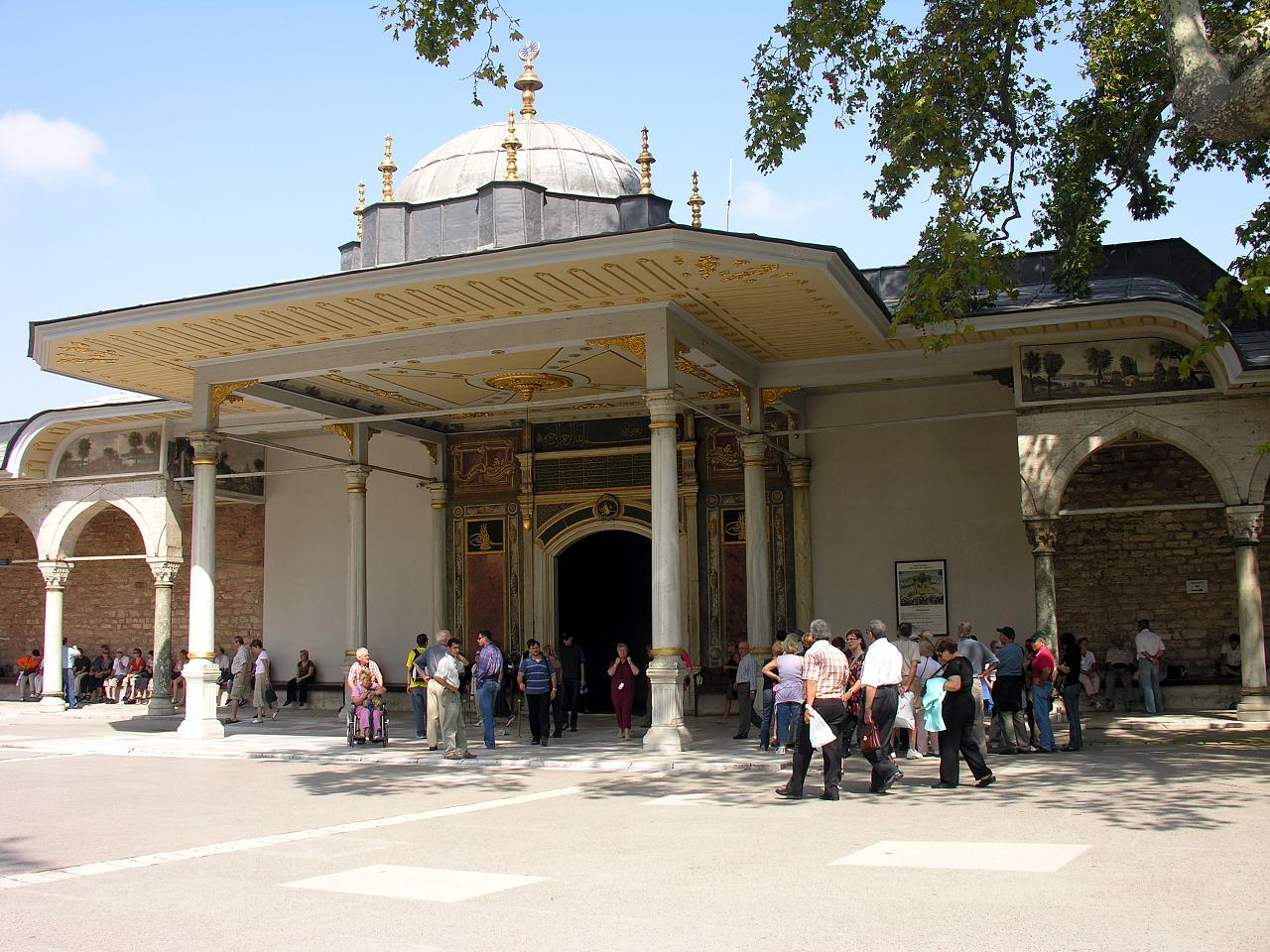 Turkey-3084